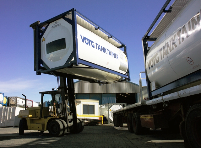 Tankcontainer bei Verladung